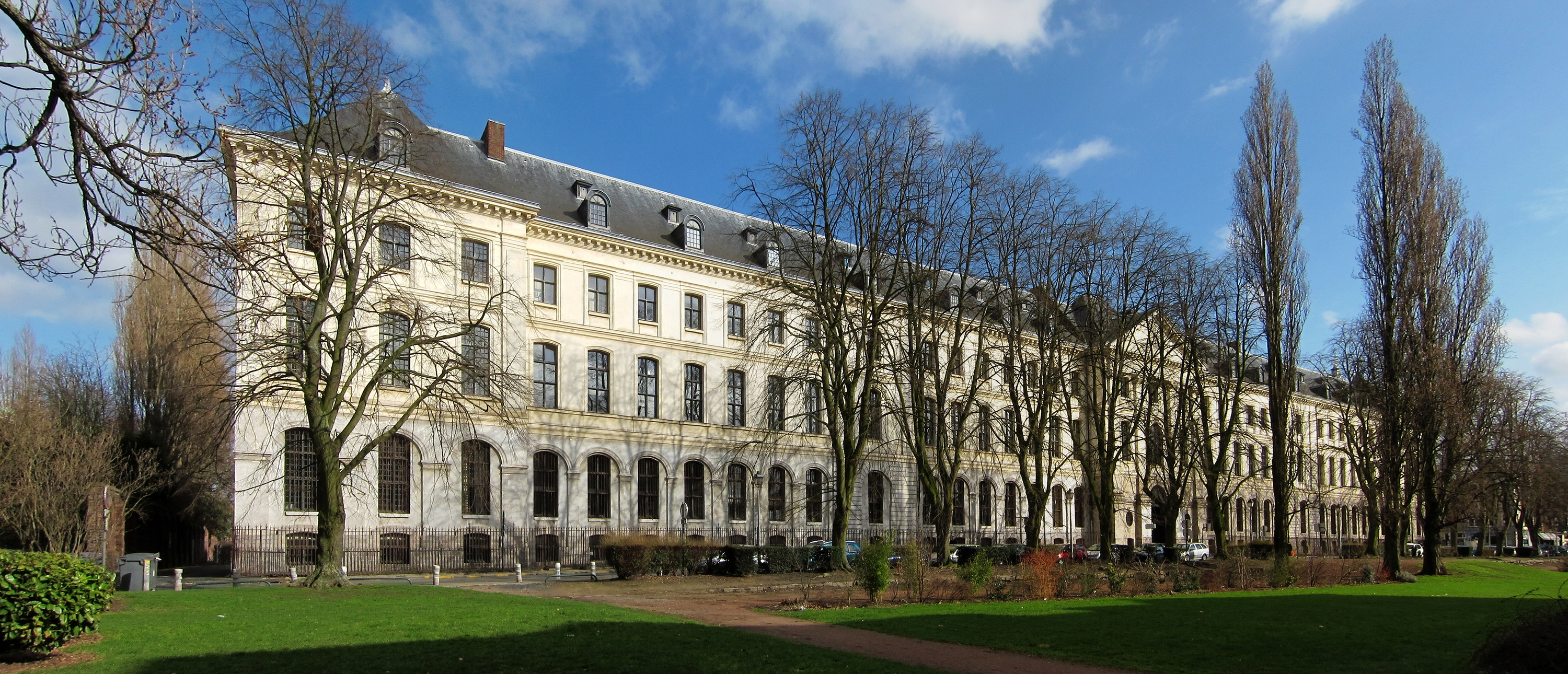 Hospice général avenue du Peuple Belge à Lille.